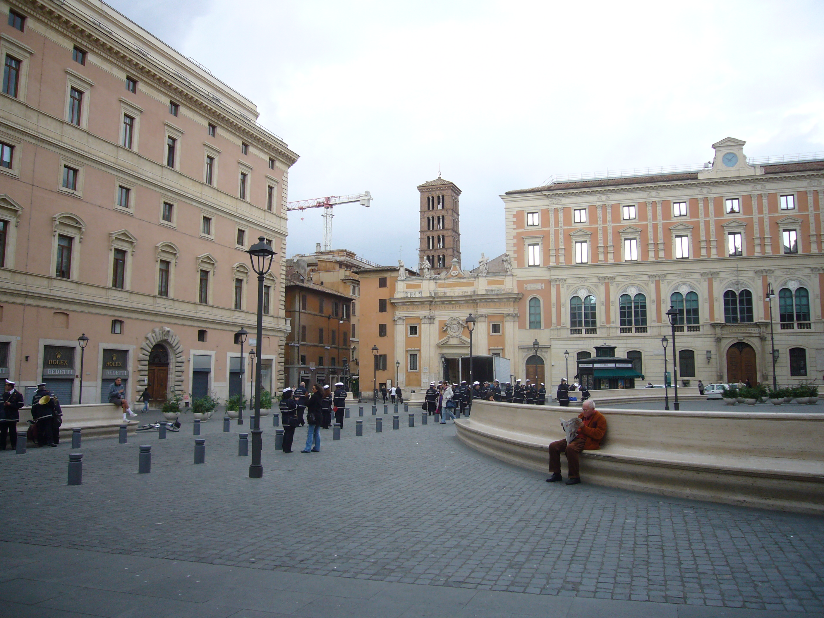 Roma, piazza S. Silvestro new look (dal 2012 ristrutturata, e senza i capolinea ATAC).